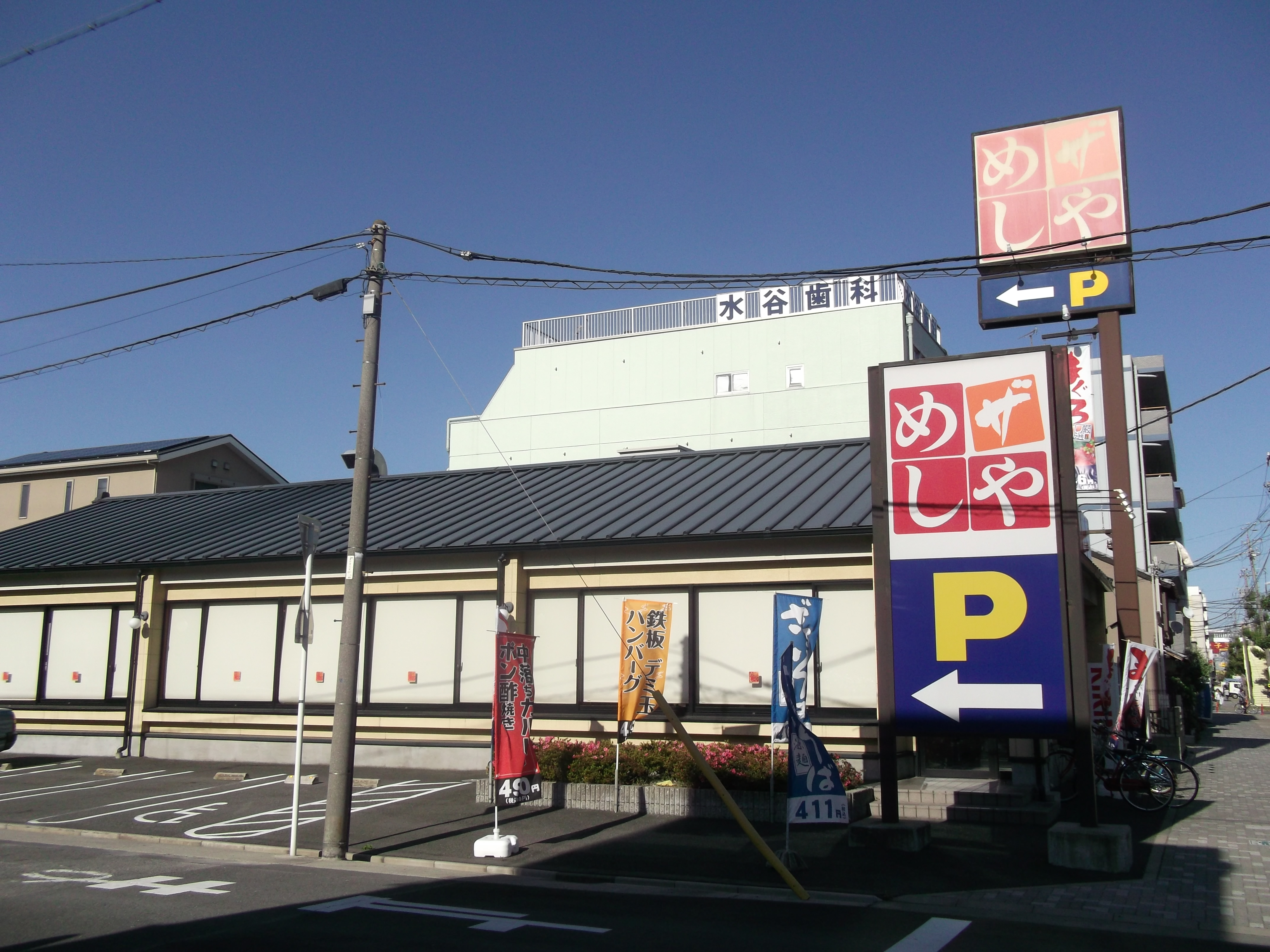 名古屋市瑞穂区のザめしや妙音通店を南側公道西側から写す